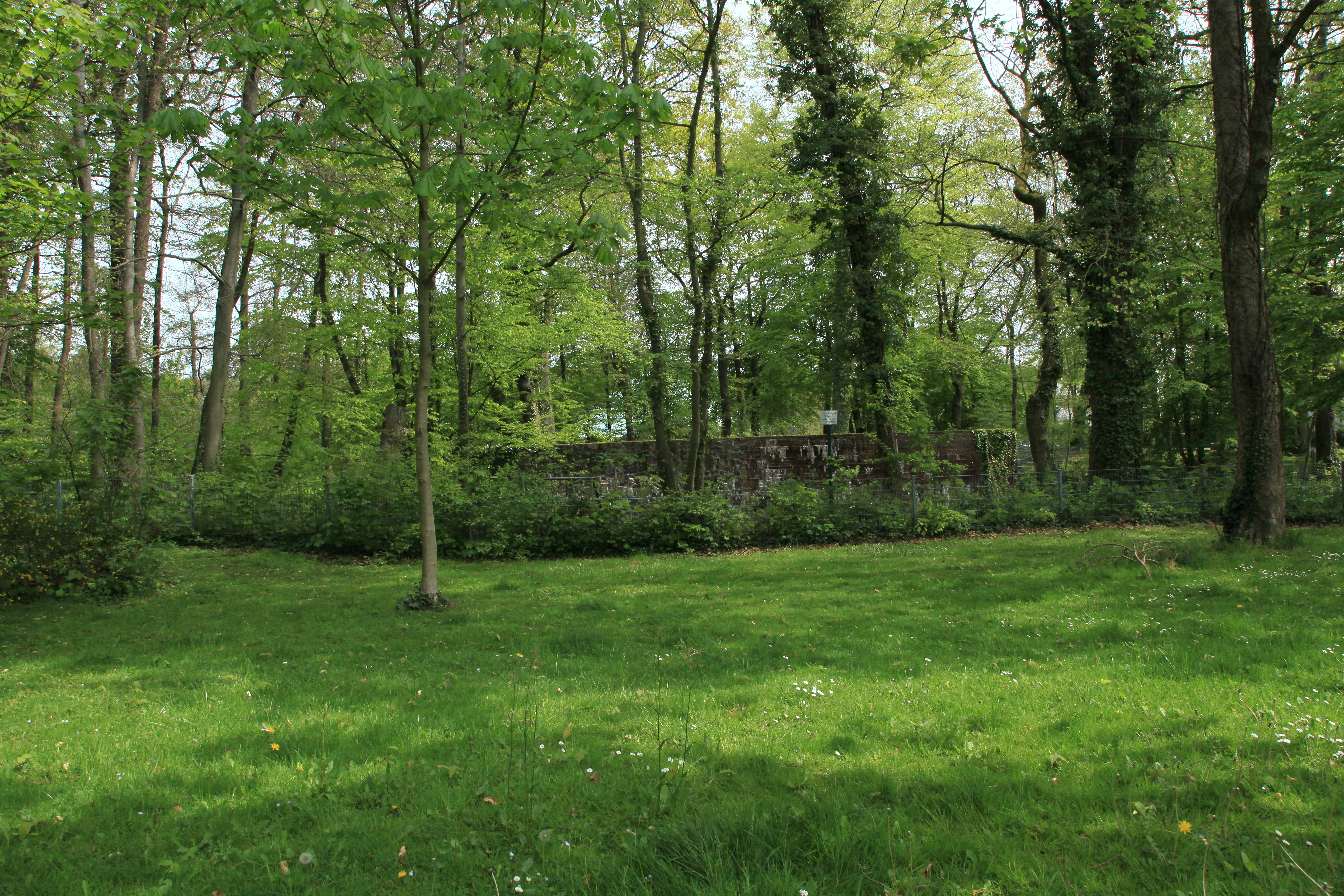 Motte Kippekausen, Burgplatz in Refrath, Bergisch Gladbach